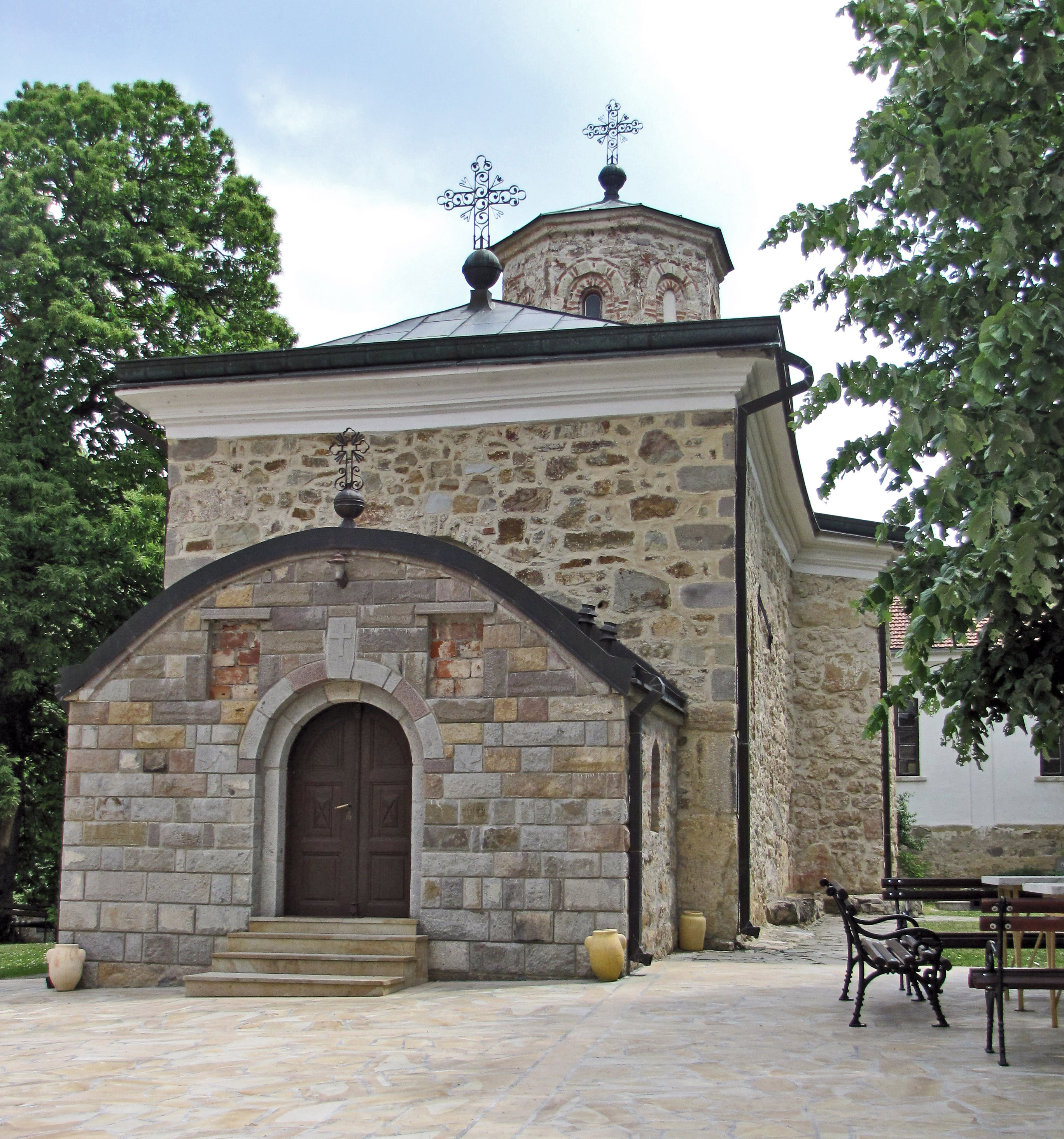 Храм посвећен Рођењу Пресвете Богородице, Налази се украј села Честин, недалеко од Груже, Према народном предању основао га је деспот Стефан Лазаревић, од преосталог камена при зидању манастира Каленић, Градња цркве почела је 1416. године, Нема података када је запустео, Јоаким Вујић га помиње као парохијску цркву, За време обнове 1870. године, преко старог живописа Димитрије Посниковић је урадио нови, Прилоге обнови дали су и српски краљеви Александар Обреновић и Петар Карађорђевић, У порти се налази споменик палим ратницима из Првог светског рата, а на гробљу је сахрањено неколико познатих личности, међу којима и родитељи Томе Вучића Перишића